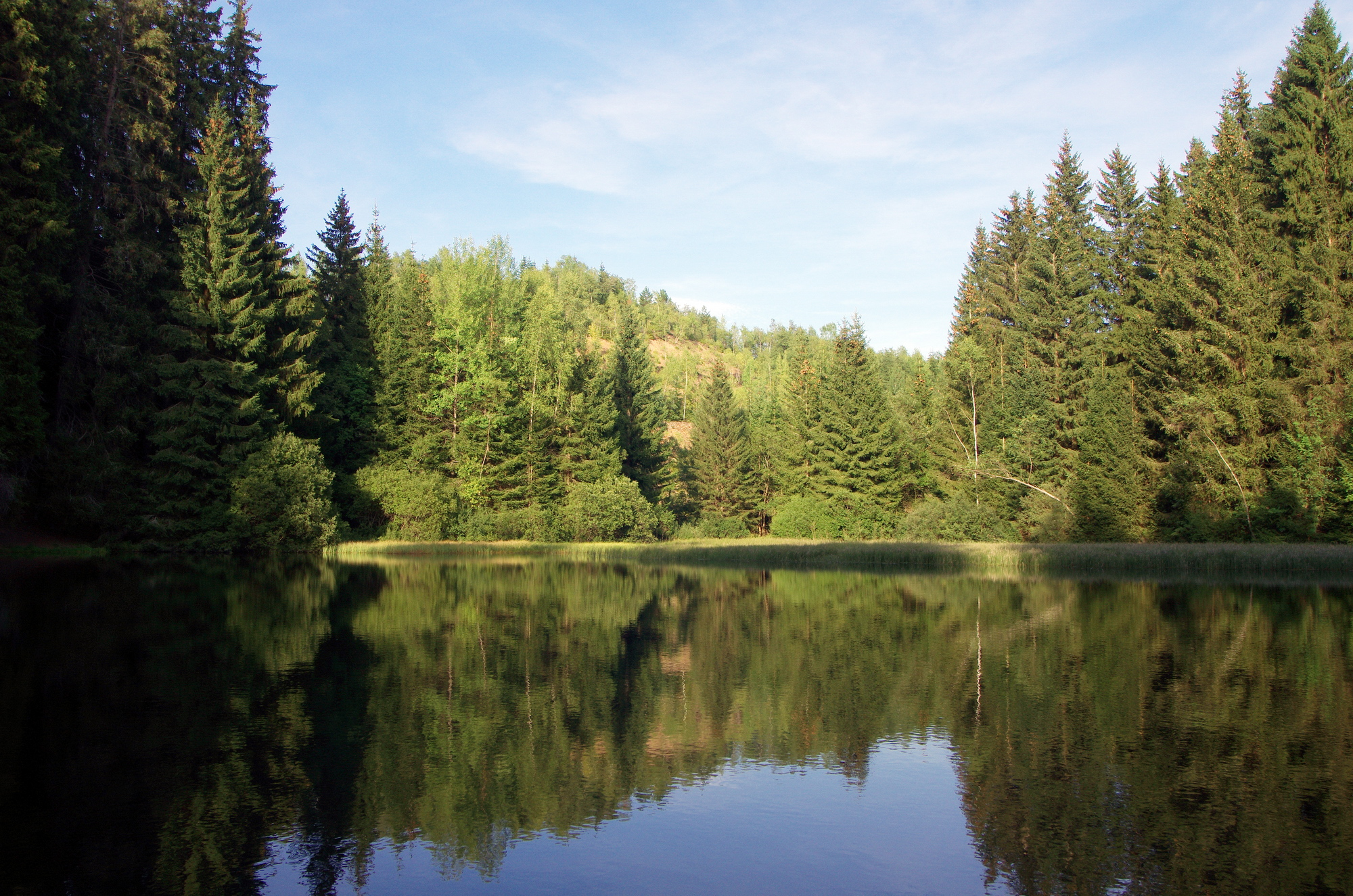 Jáchymov, Heinzův rybník na Eliášovo potoce nad bývalou šachtou Eliáš, Krušné hory, okres Karlovy Vary